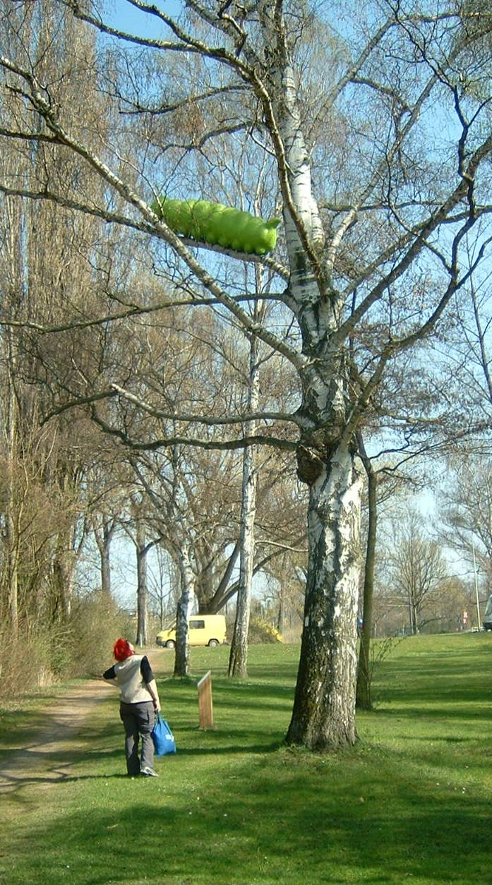 Dicke Raupe. Skulptur von de: F. K. Waechter im Erlenbruch in Frankfurt-Riederwald